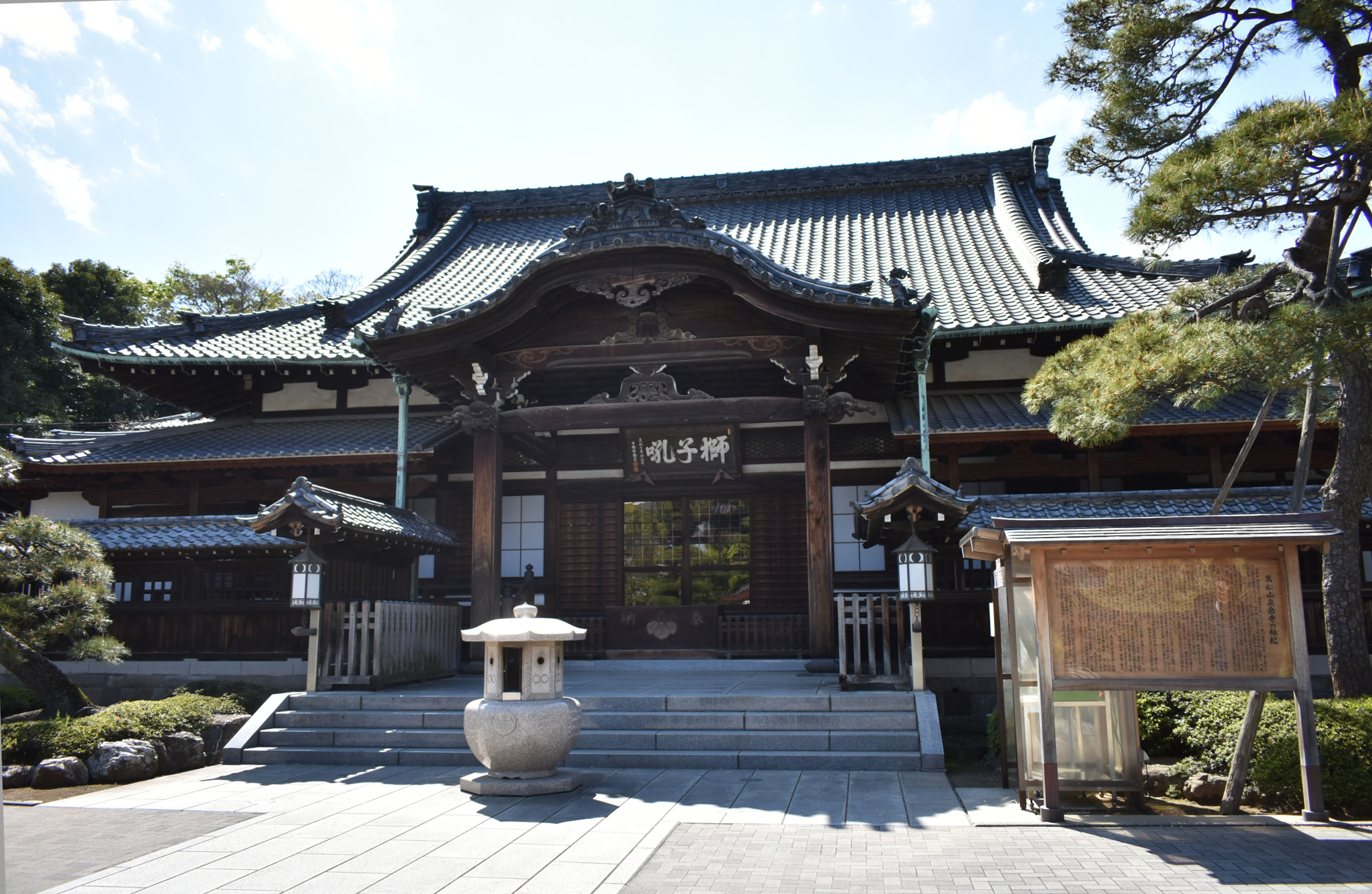 高輪 泉岳寺 Nikon D3400